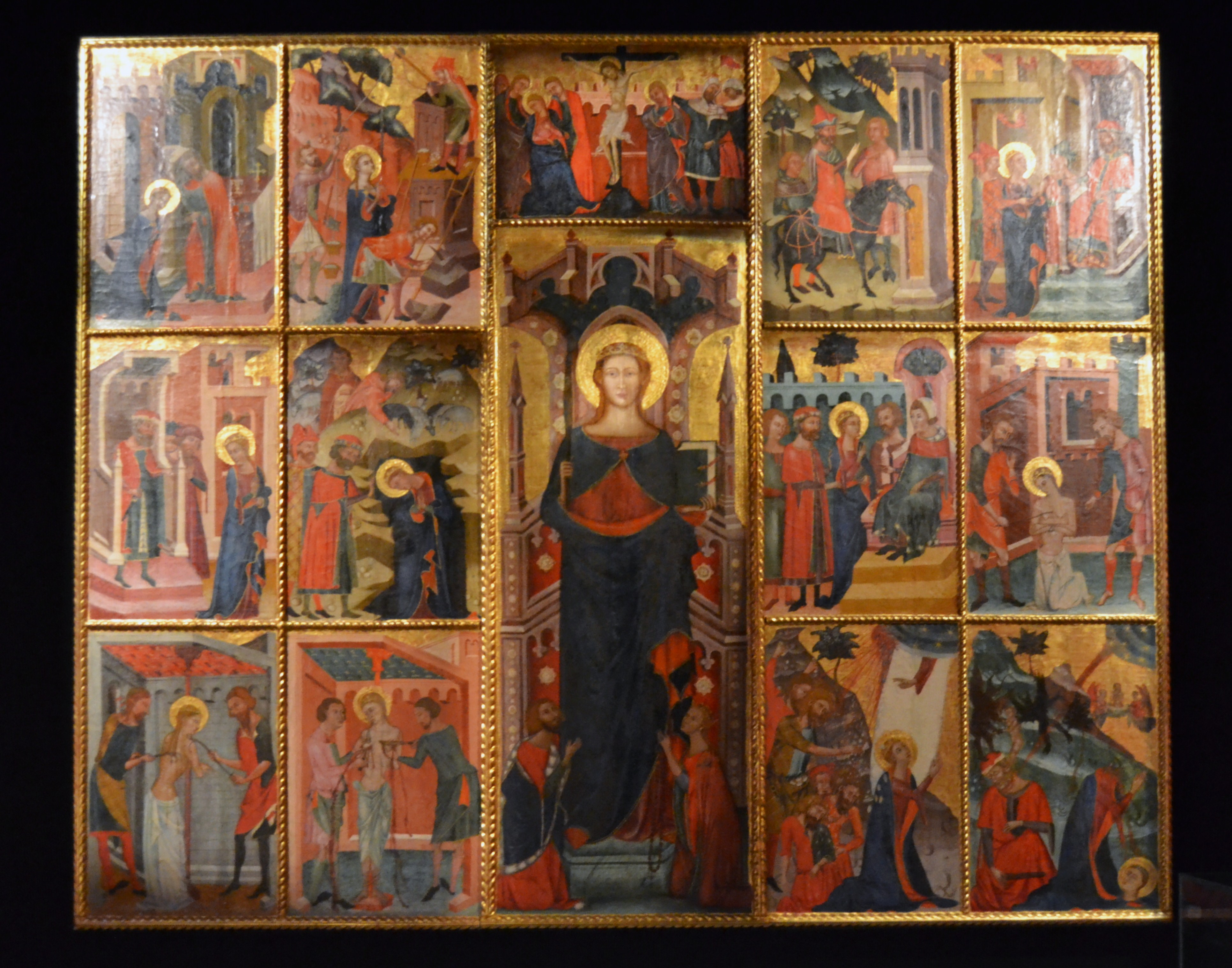 Retaule de santa Bàrbara, Cocentaina. Fusta, segona meitat del segle XIV, procedent de l'ermita de Santa Bàrbara. Museu Municipal de Cocentaina. El retaule de Santa Bàrbara de Cocentaina està considerat actualment com un dels millors testimonis conservats de la pintura italogòtica de la baixa edat mitjana. Datat prop del 1378-1387, l'obra va ser promoguda per dos membres de la família Llúria per a l’ermita de Santa Bàrbara, ubicada al cim d’una serreta que duu el mateix nom situat als afores de la localitat. Allí va romandre fins al 1974 quan, per motius de seguretat i del mal estat de conservació, va ser traslladat al Palau Comtal. La tipologia respon als retaules del trecento italià en que la imatge del titular es situa al centre i als costats taules amb escenes naturalistes que descriuen la vida i el martiri de la santa. Amb un total de dotze escenes narratives constitueix el conjunt pictòric medieval valencià més complet sobre la conversió, martiri i mort de Santa Bàrbara, inspirat en la Llegenda Daurada de Jaume de Voràgine, principal font literària d’inspiració de la iconografia medieval.